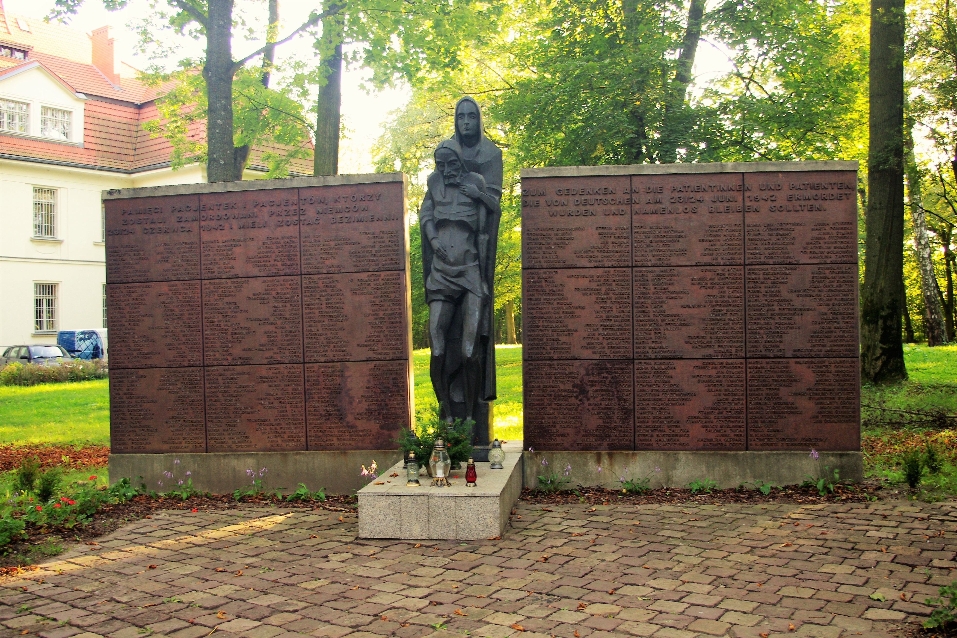 Tablice upamiętniające pomordowanych pacjentów Zakładu dla Umysłowo i Nerwowo Chorych w Kobierzynie, zamordowanych przez urzędników III Rzeszy i SS 23 czerwca 1942